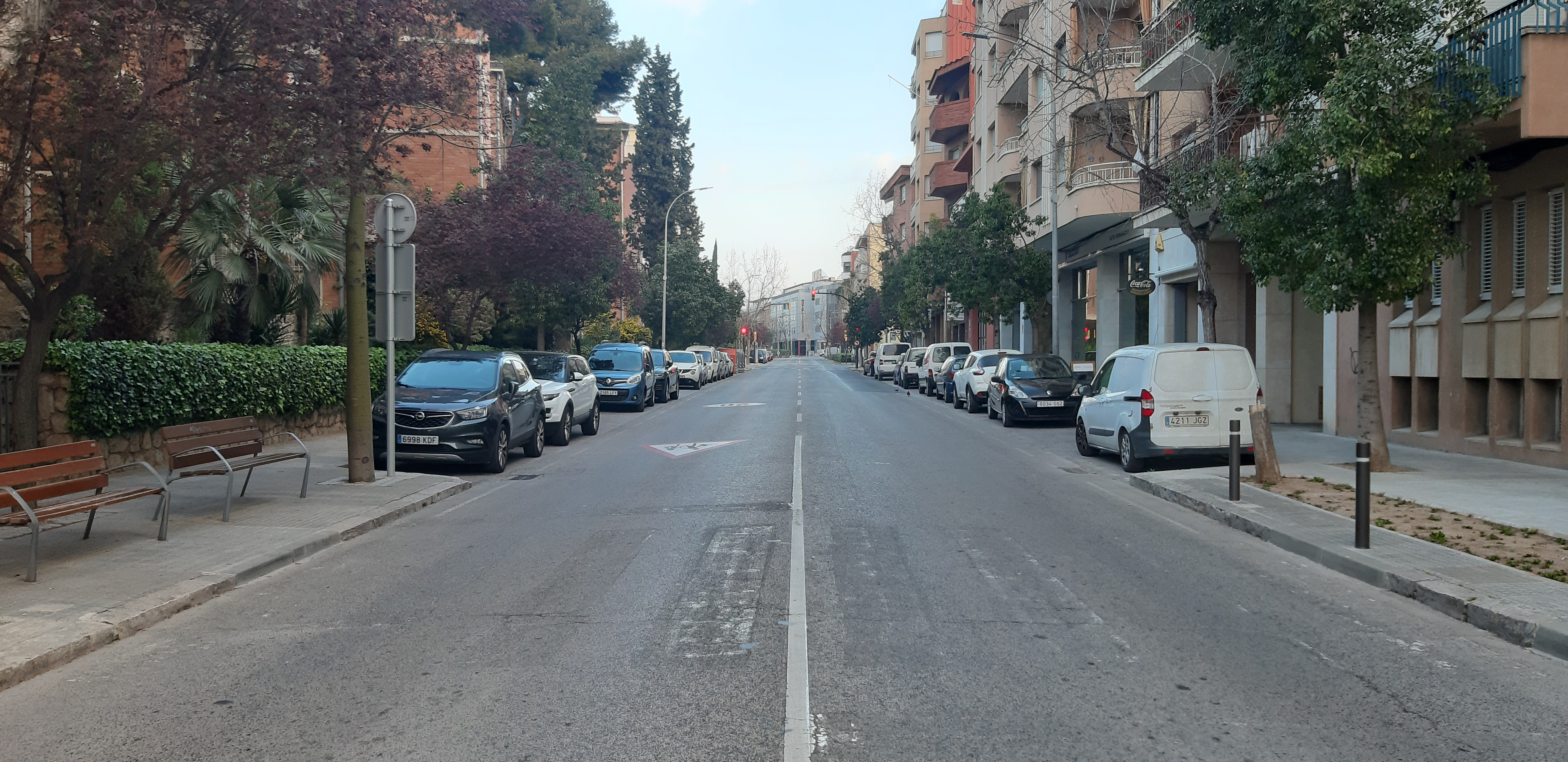 La Generalitat de Catalunya va recomanar als seus ciutadans que es quedessin a casa voluntàriament. A la foto es pot apreciar una menor activitat d'un dels carrers més principals de Vilafranca del Penedès.